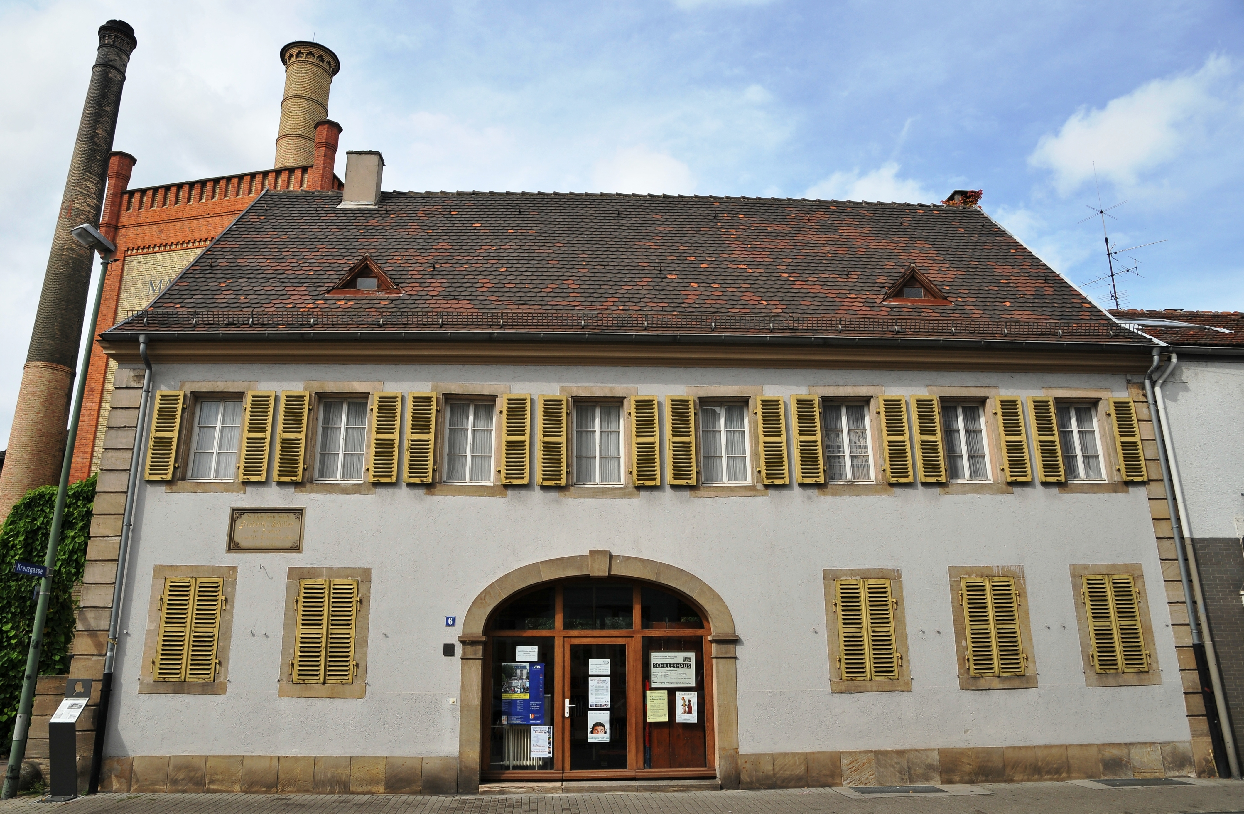 Ehemaliges Gasthaus "Zum Viehhof" in der Schillerstraße 6 in Ludwigshafen-Oggersheim. Sandsteingegliederter Putzbau mit Torfahrt, Gebaut um 1750 über einem tonnengewölbtem Keller. Unterkunft von Friedrich Schiller.